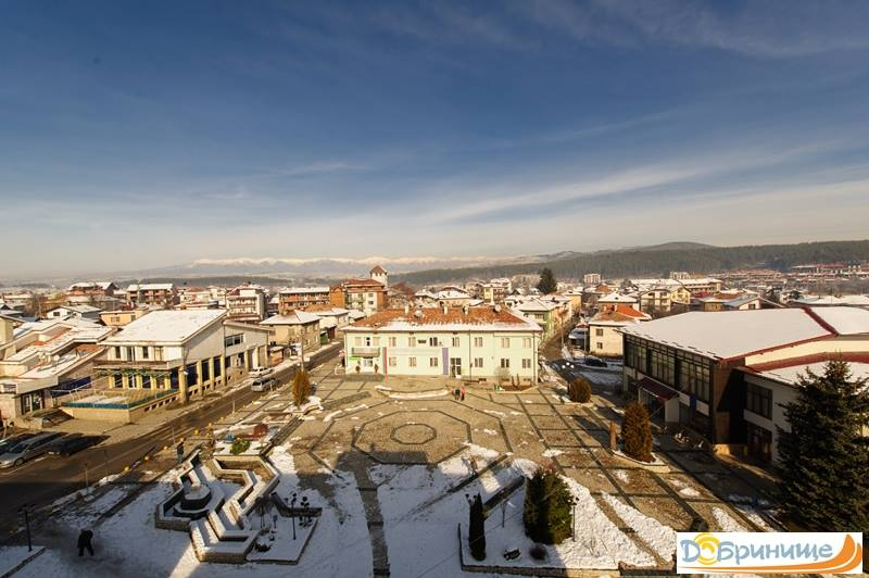 град Добринище център